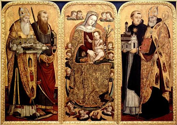 Rielaborazione da foto personale